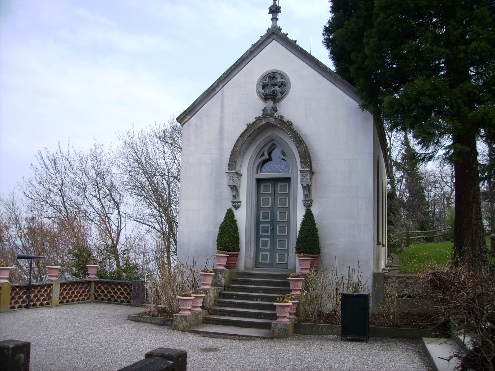 Schloss Arenenberg, Schweiz. Wohnsitz der Königin Hortense de Beauharnais und des späteren Kaisers Napoleon III. Kapelle